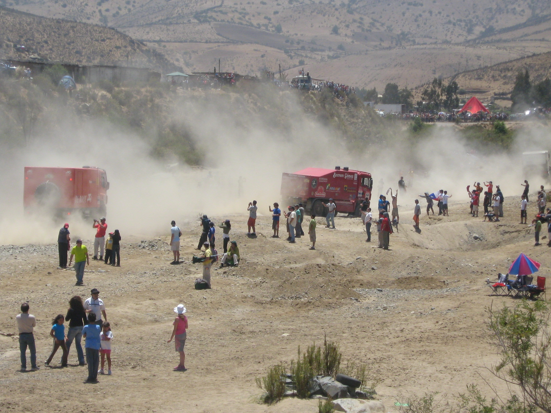 Rally dakar y su paso por Canela Baja